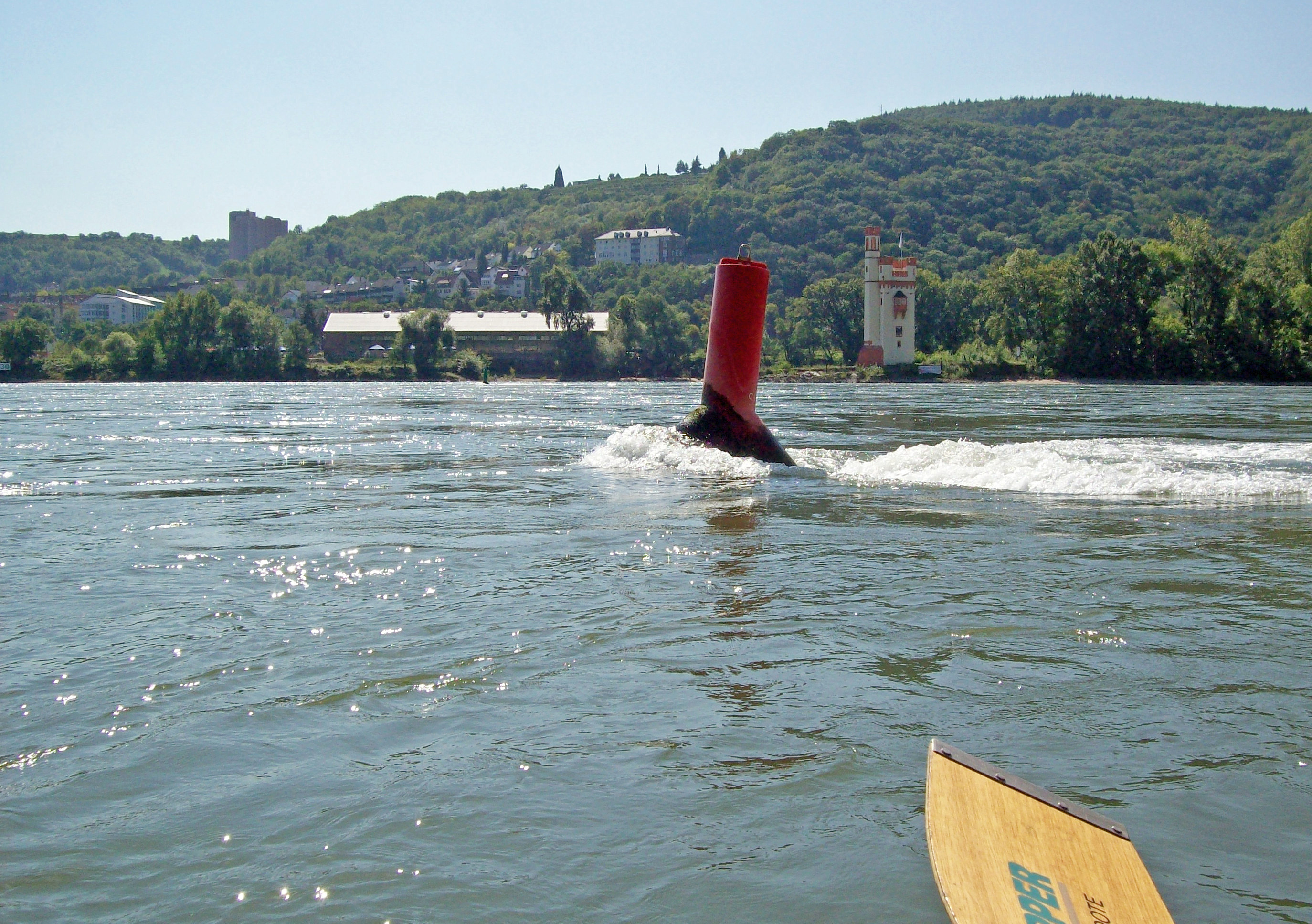 Markierungstonne im Binger Loch mit Mäuseturm